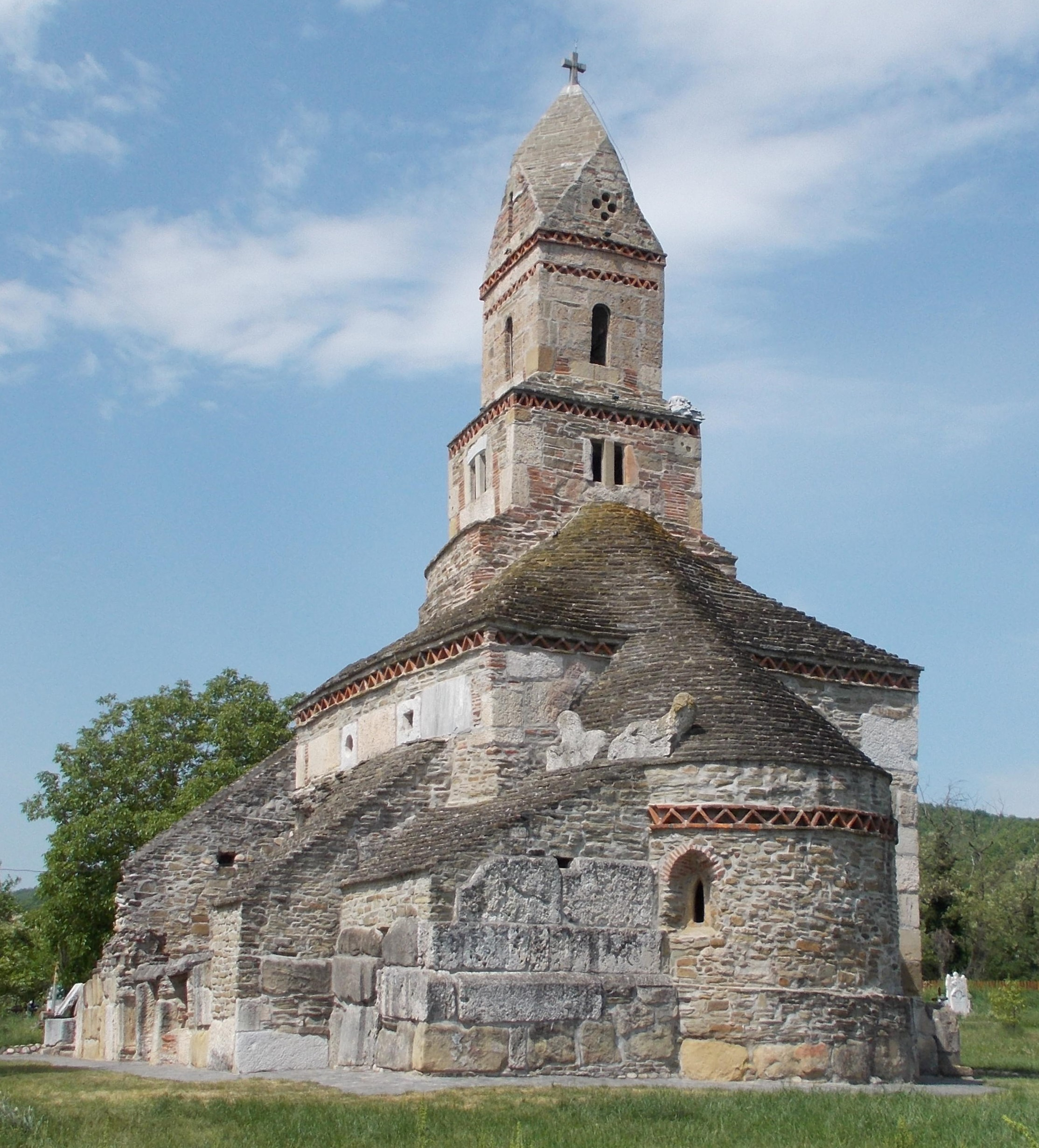 Biserica „Sf. Nicolae” din satul Densuș, județul Hunedoara